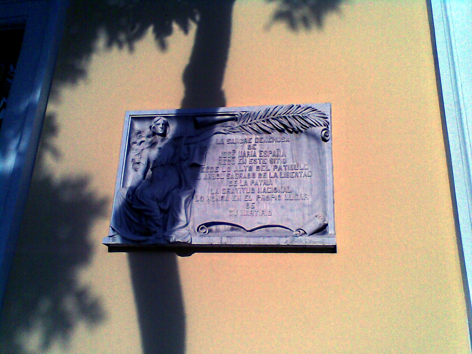 LA SANGRE GENEROSA DE JOSÉ MARIA ESPAÑA REGÓ EN ESTE SITIO DESDE LO ALTO DEL PATIBULO EL ARBOL DE LA LIBERTAD DE LA PATRIA LA GRATITUD NACIONAL LO HONRA EN EL PROPIO LUGAR DE SU MARTIRIO (Casa Amarilla, esquina noroeste de la entonces Plaza Mayor y actual Plaza Bolívar de Caracas)